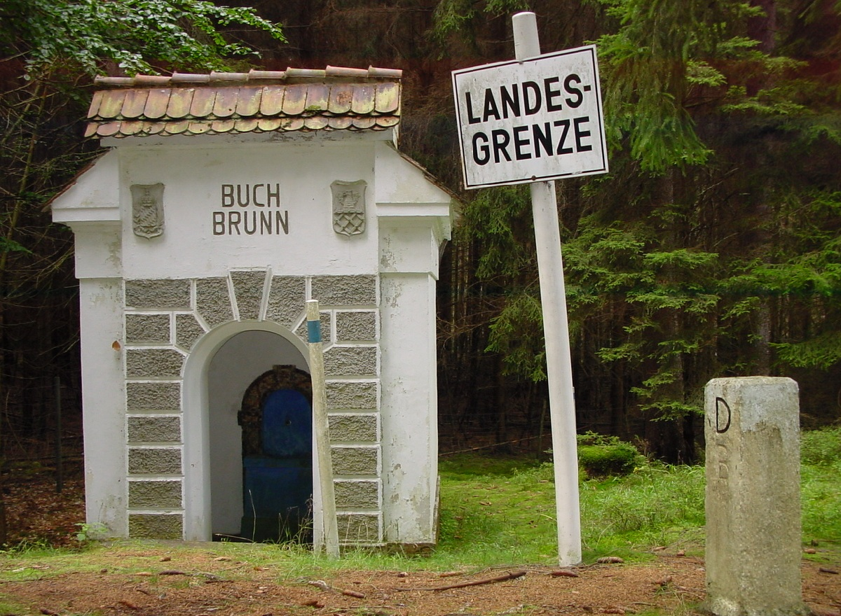 Brunnenhaus der Buchbach-Quelle im Kohlwald/Fichtelgebirge